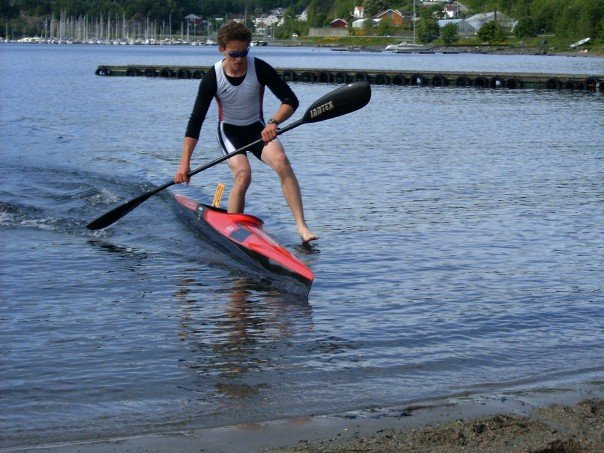 Overbæring i kajakk